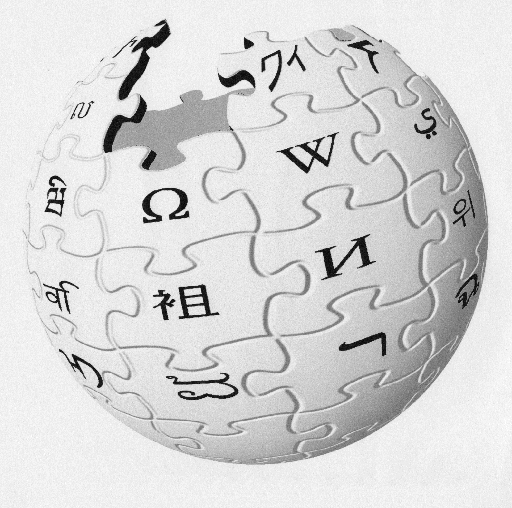 Zeilenscan der unbewegten Wiki-Kugel